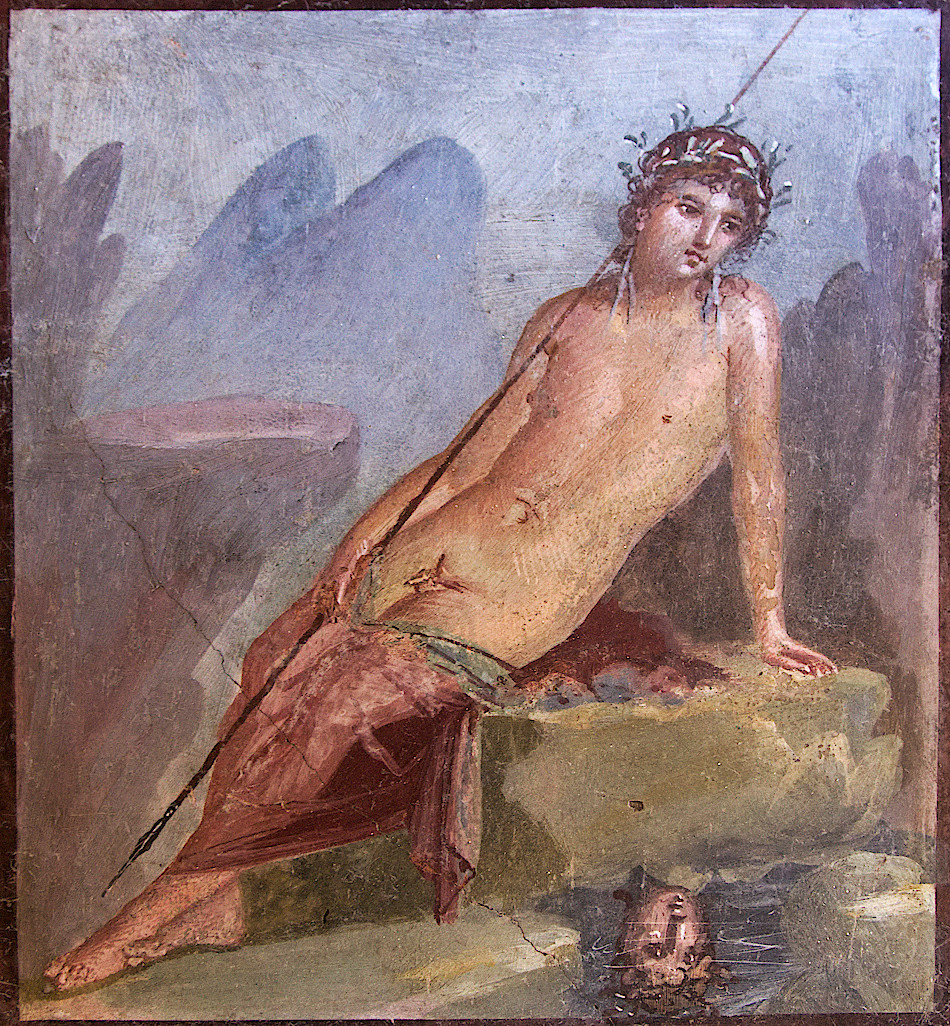 Narkissos från en av byggnaderna i Pompeji.